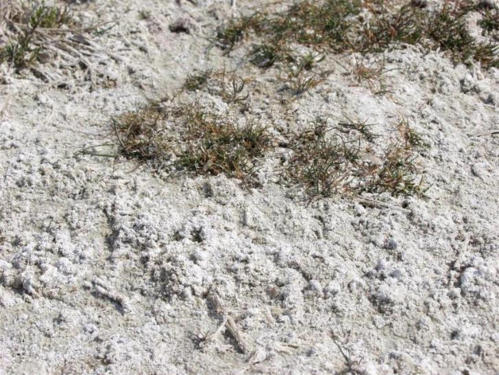 Sókiülepedés (Mekszikópuszta, Győr-Moson-Sopron megye)